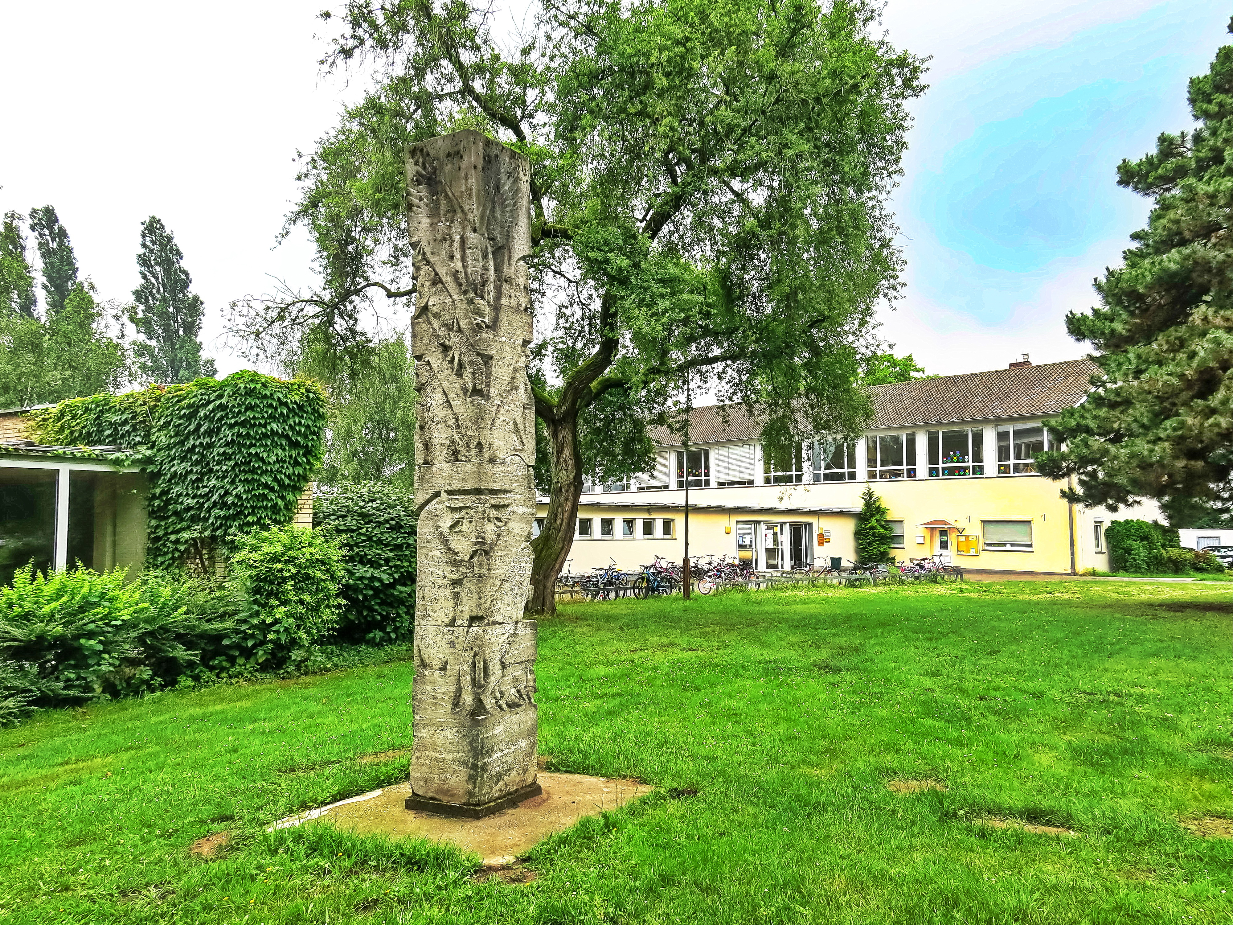 Tierpfeiler; Die Skulptur von Ernemann Sander wurde 1962 an der Paulusschule im Bonner Ortsteil Tannenbusch aufgestellt.